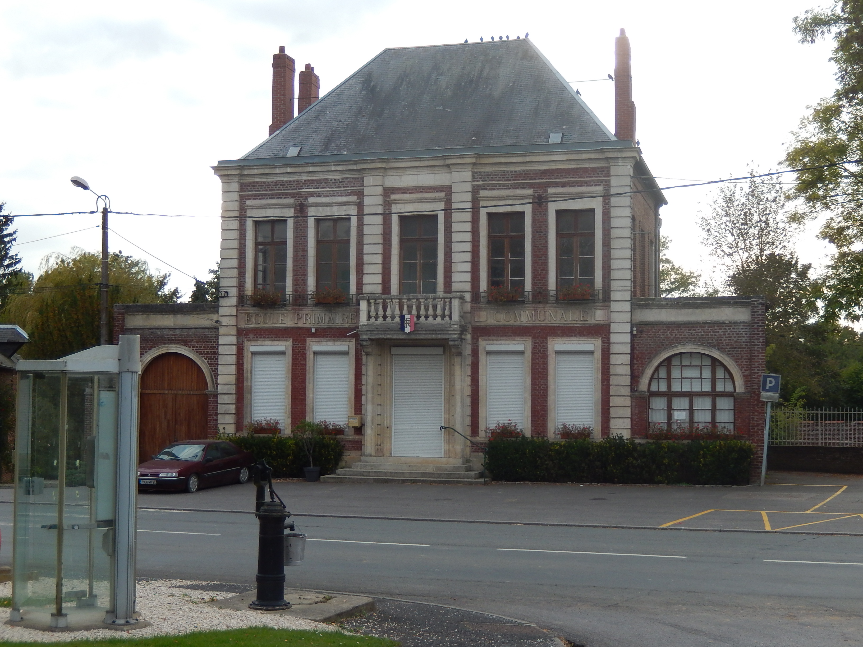 Athies (Somme) - la mairie